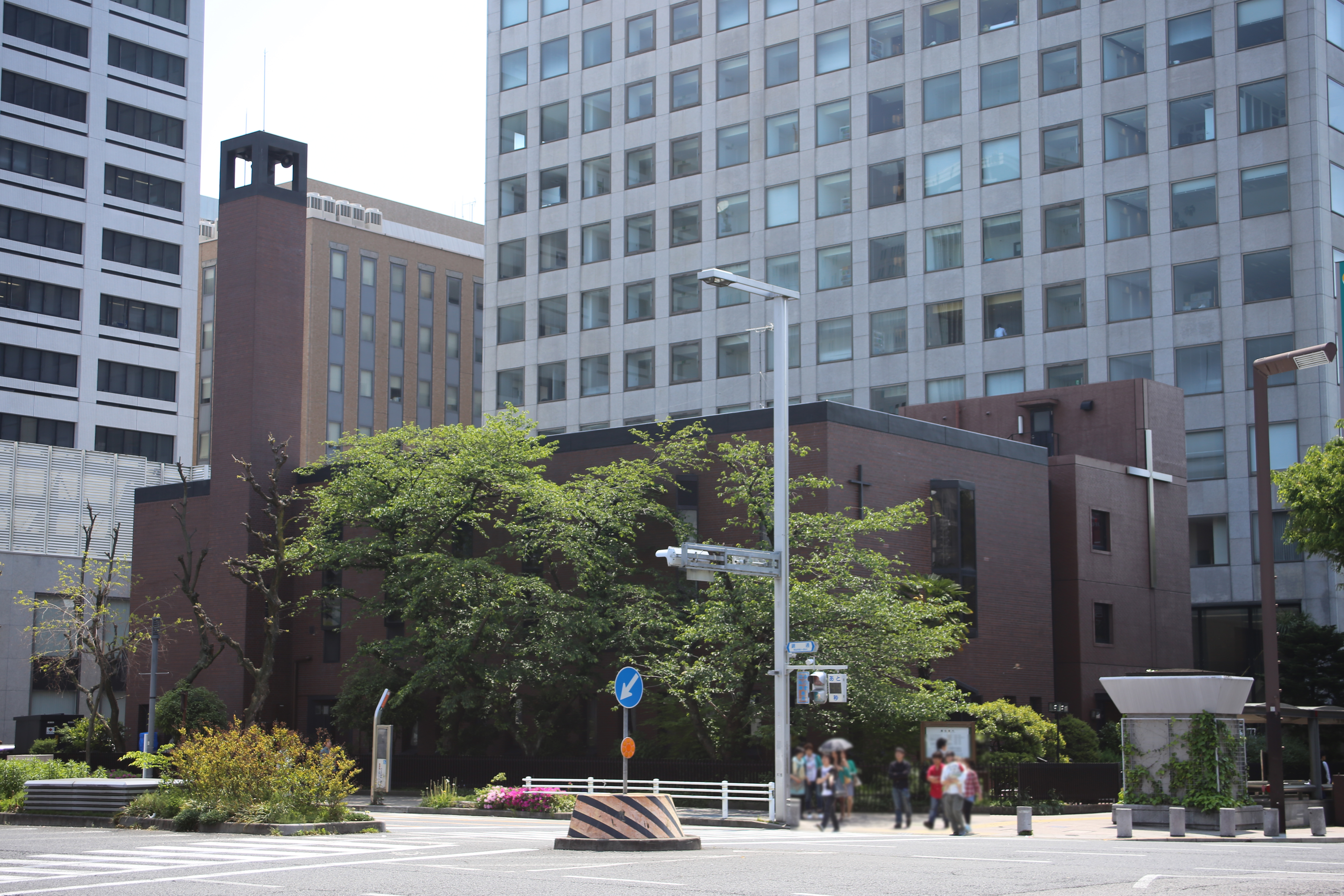 名古屋市東区久屋町の名古屋中央教会を北側公道西側より撮影。ただし、人物につき画像処理済み。